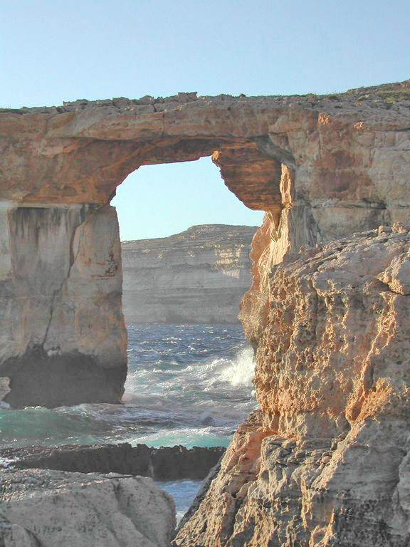 Blo Fënster zu Gozo.